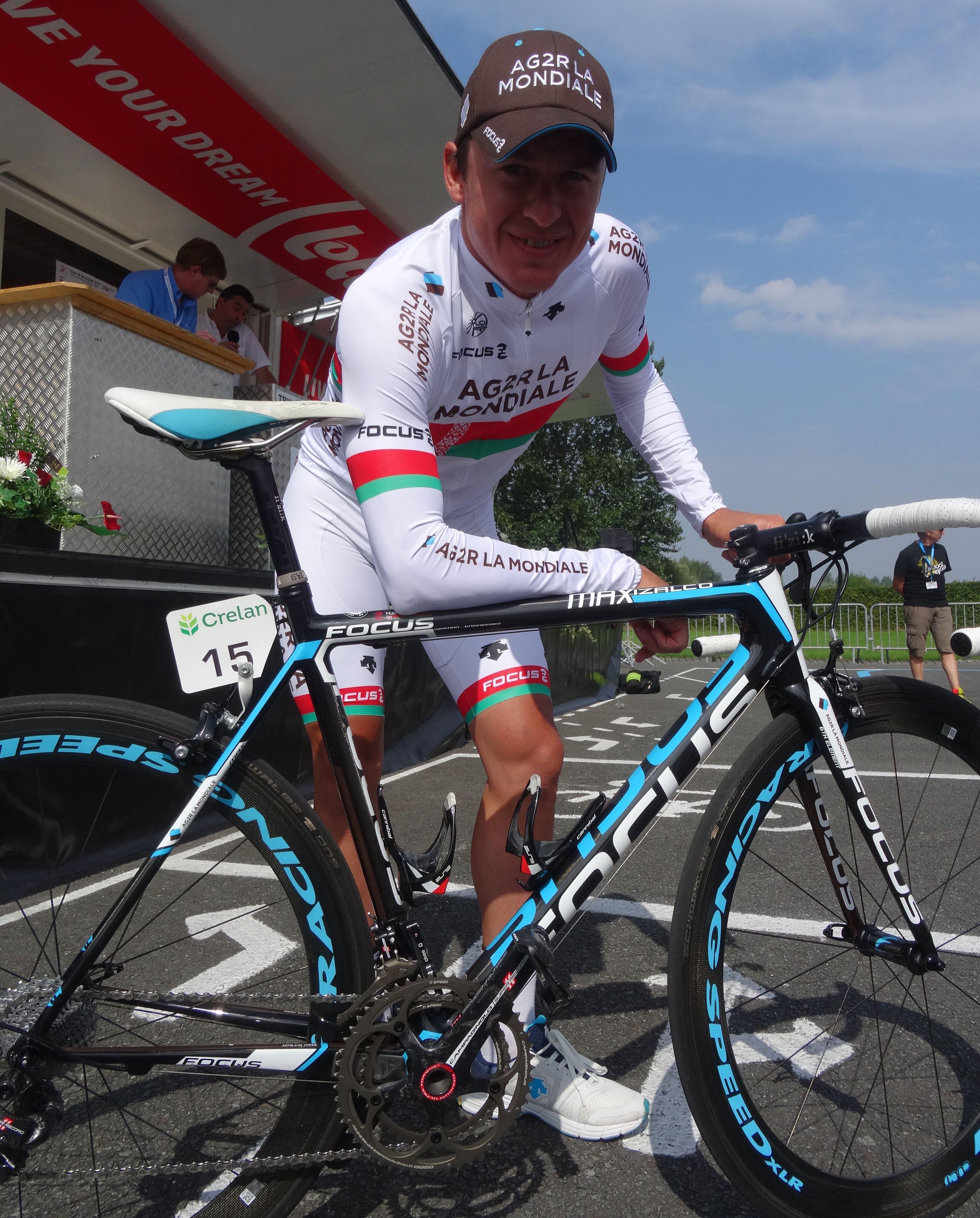 Reportage photographique réalisé le dimanche 27 juillet à l'occasion du départ de la deuxième étape du Tour de Wallonie 2014 à Péronnes-lez-Antoing (Antoing), Belgique.